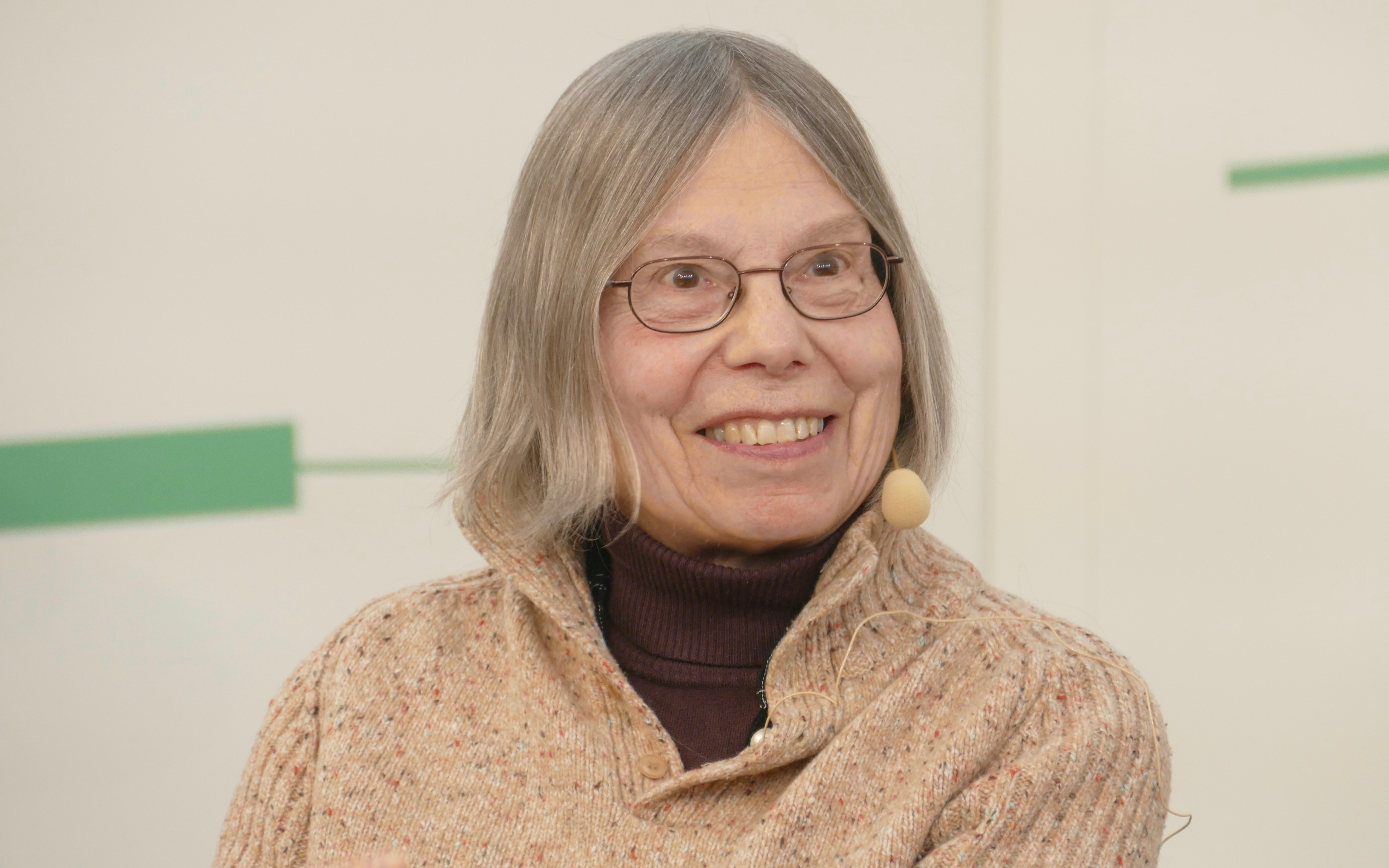 Gretchen Dutschke stellt auf der Leipziger Buchmesse ihr Buch "1968: Worauf wir stolz sein dürfen" vor.